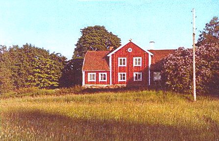 Fisksätra Gård 13 juni 1966. Angripen av husbock, hela stugan tömd.